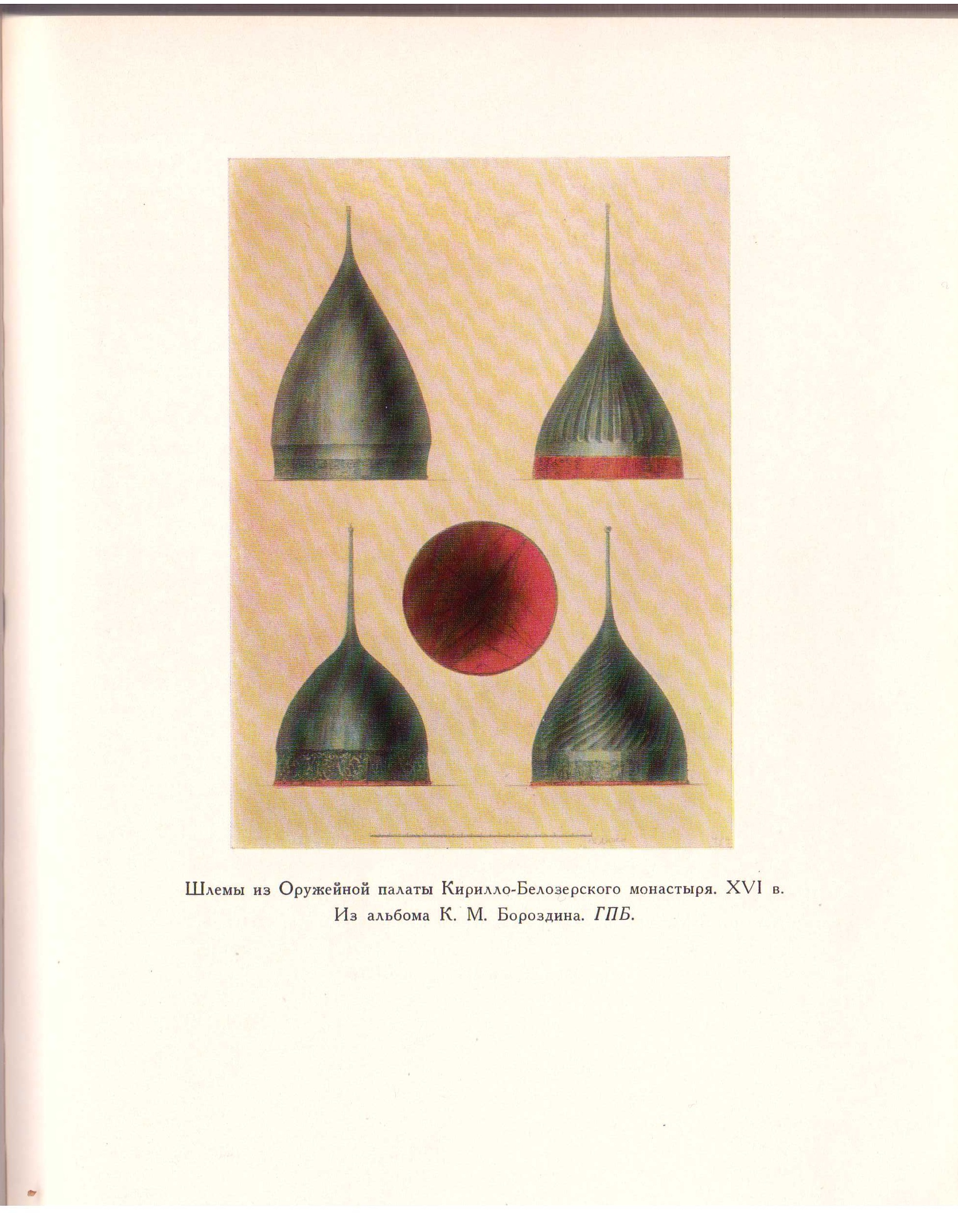 Примеры русских шеломов из арсенала Кирилло-Белозерского монастыря